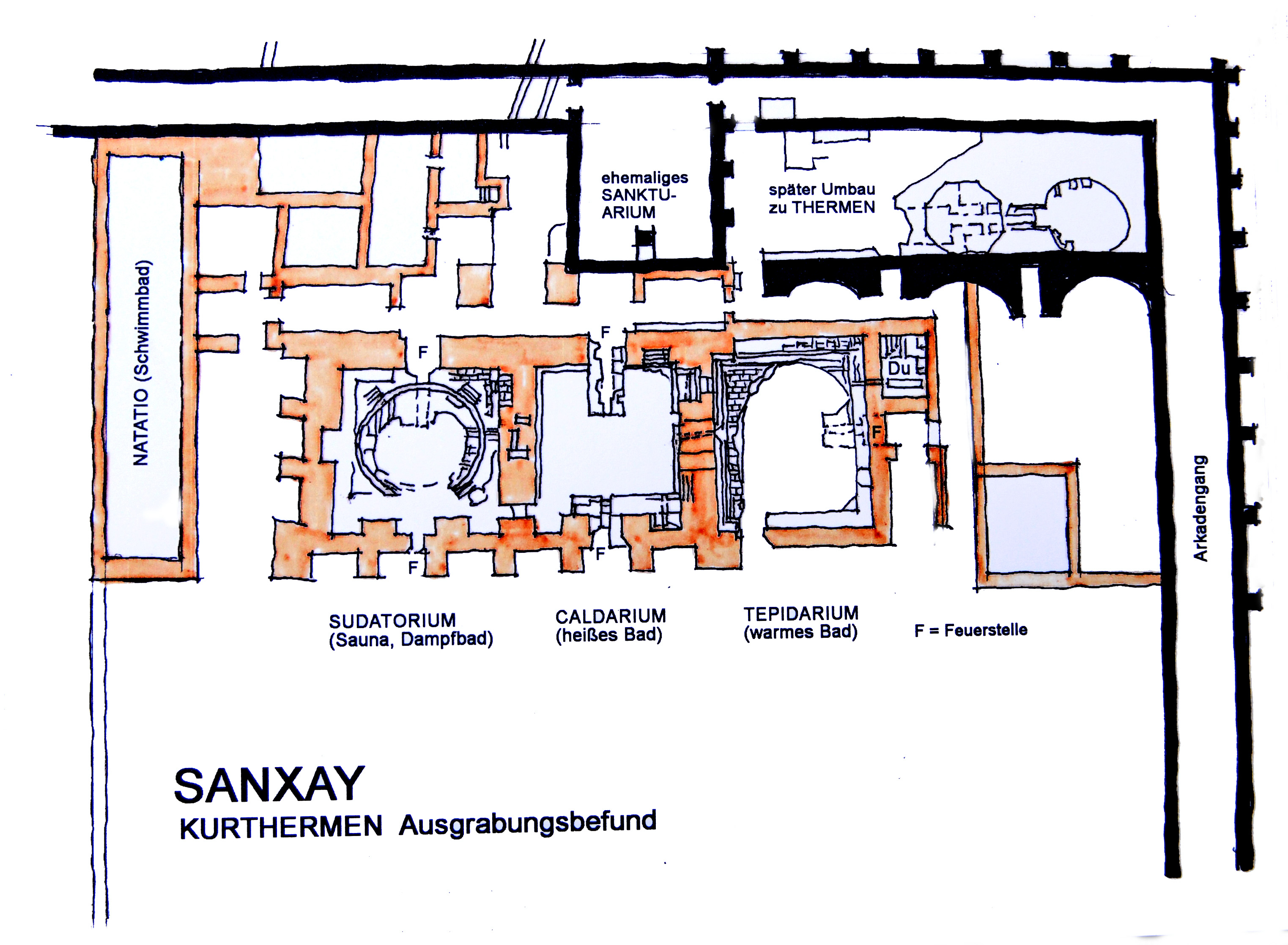 Sanxay, gallo-röm. Kurthermen, Grabungsbefund